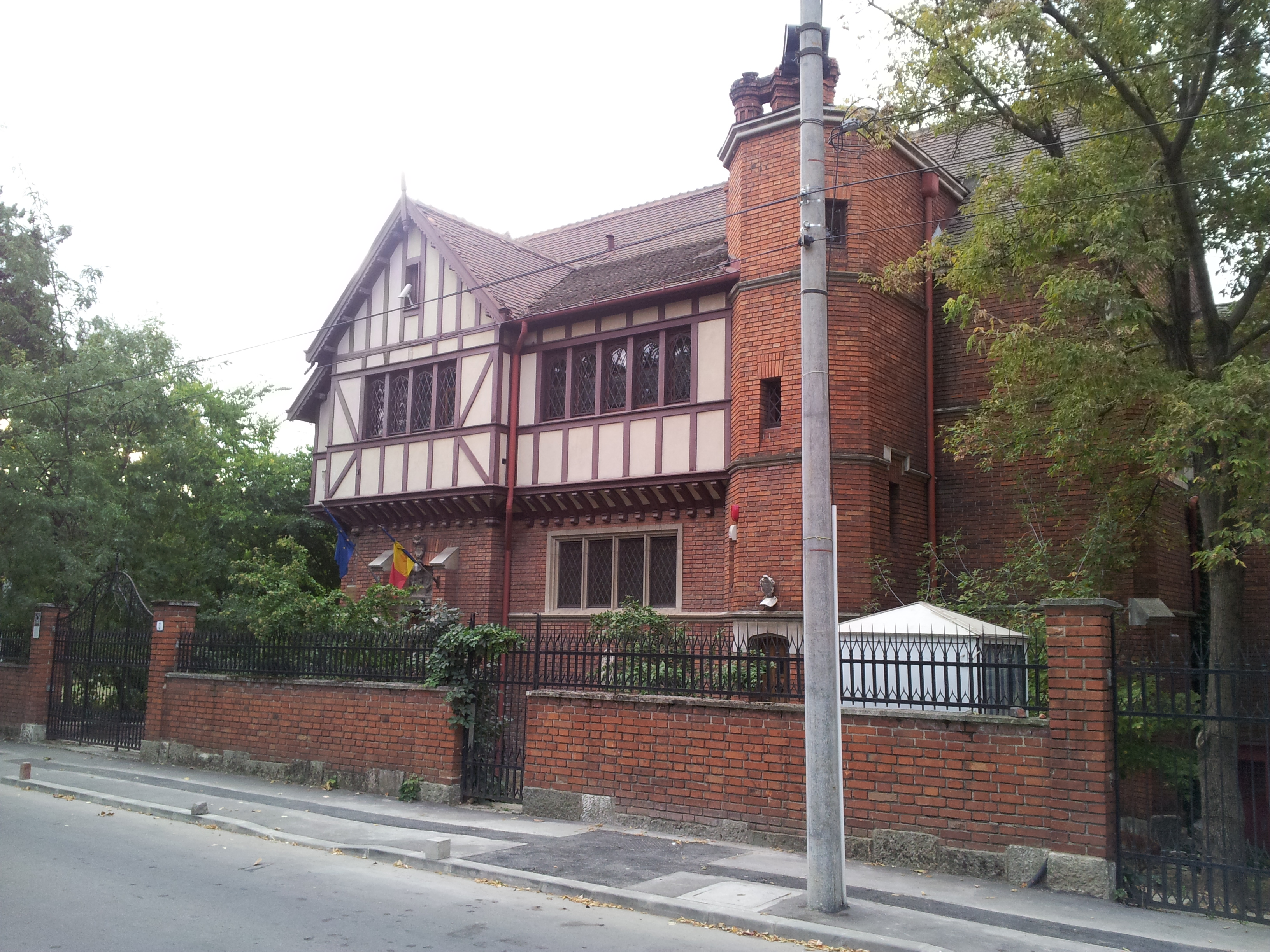 Muzeul de Artă Medievală Ing. D. Minovici B-II-m-A-19207